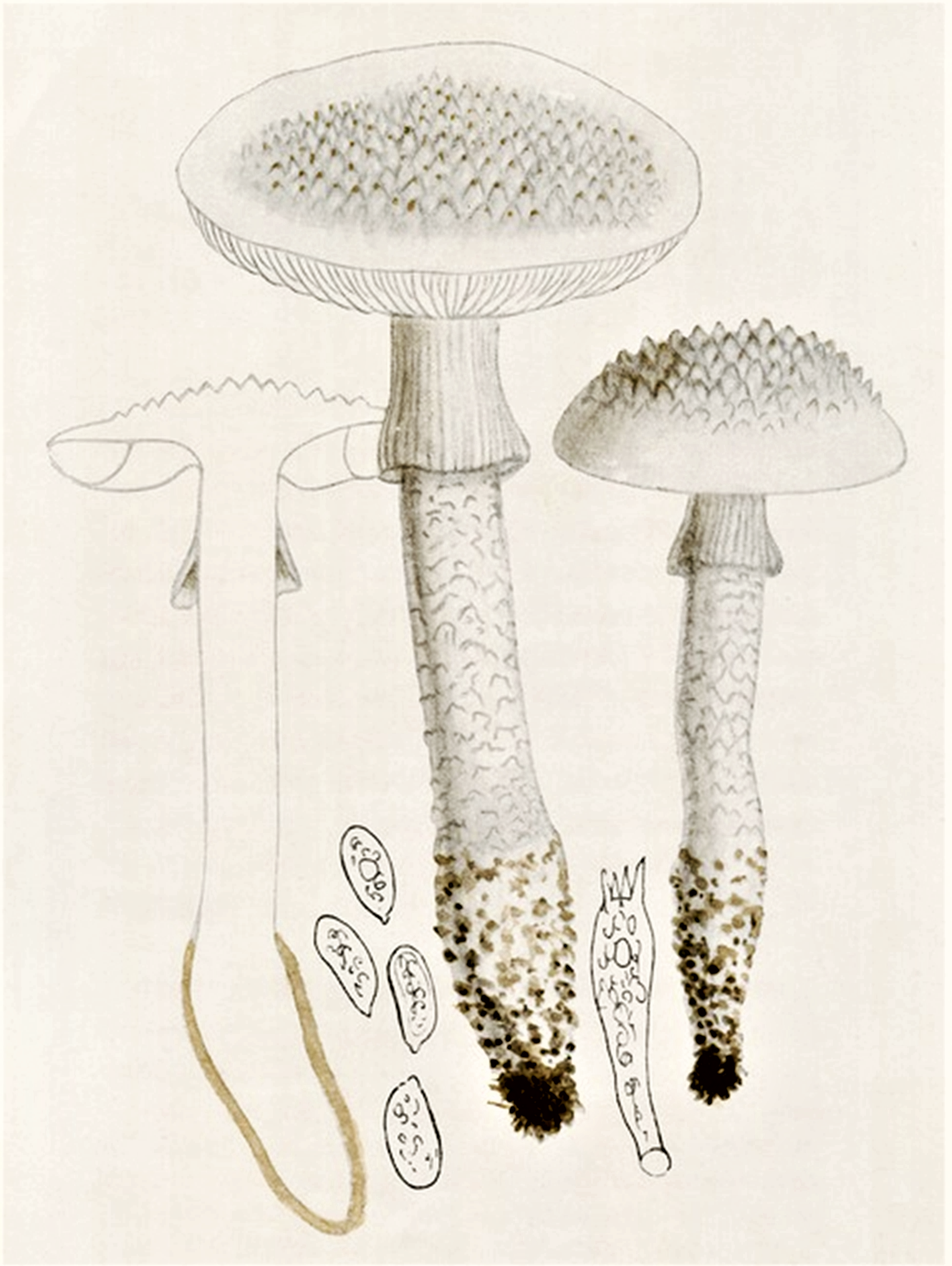 Giacomo Bresadola: Amanita boudieri Barla (1887)